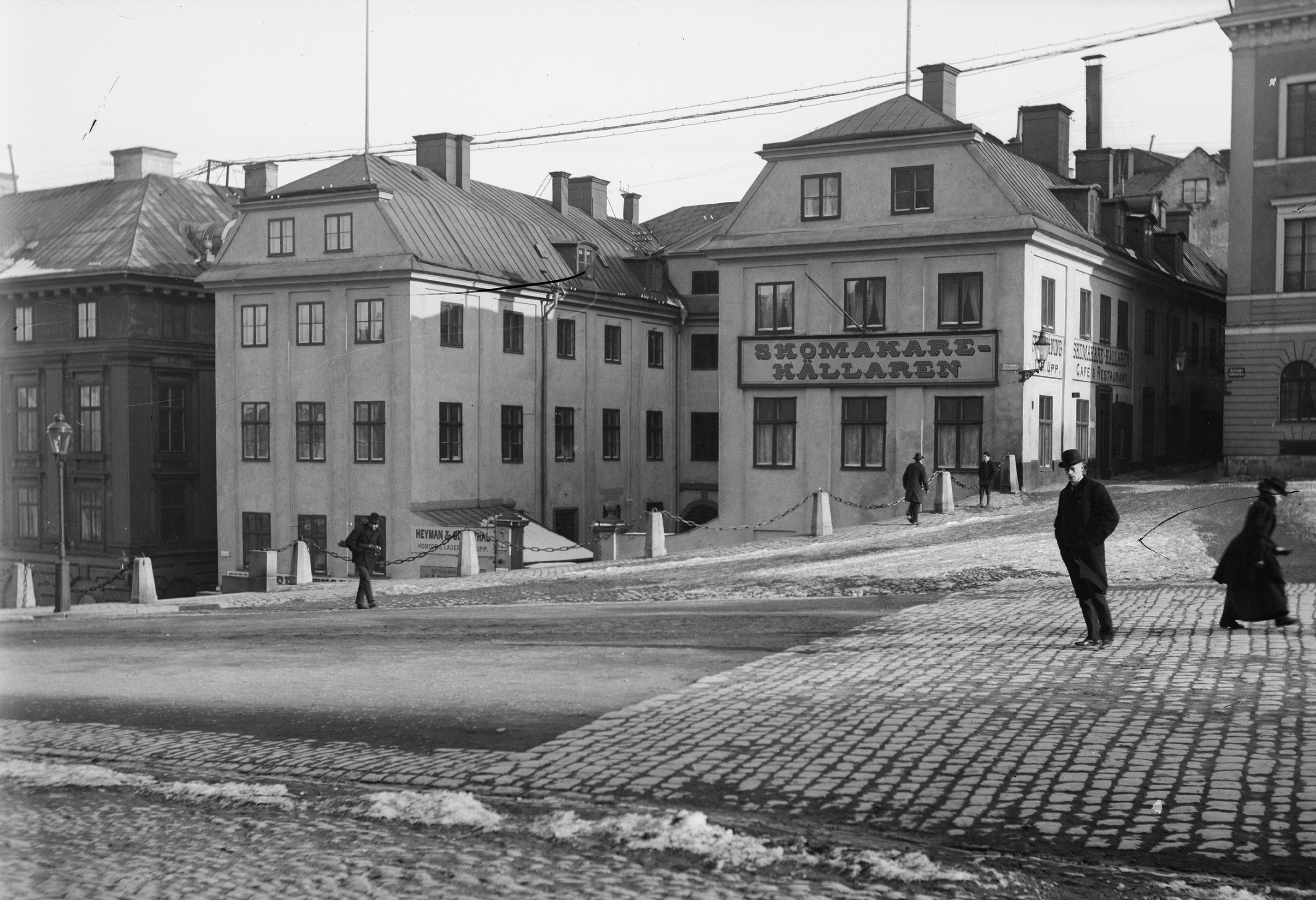 Skomakare-Källaren vid Slottsbacken, och firma Heyman & Schönthal. I huset är numera Kungliga Myntkabinettet inrymt.